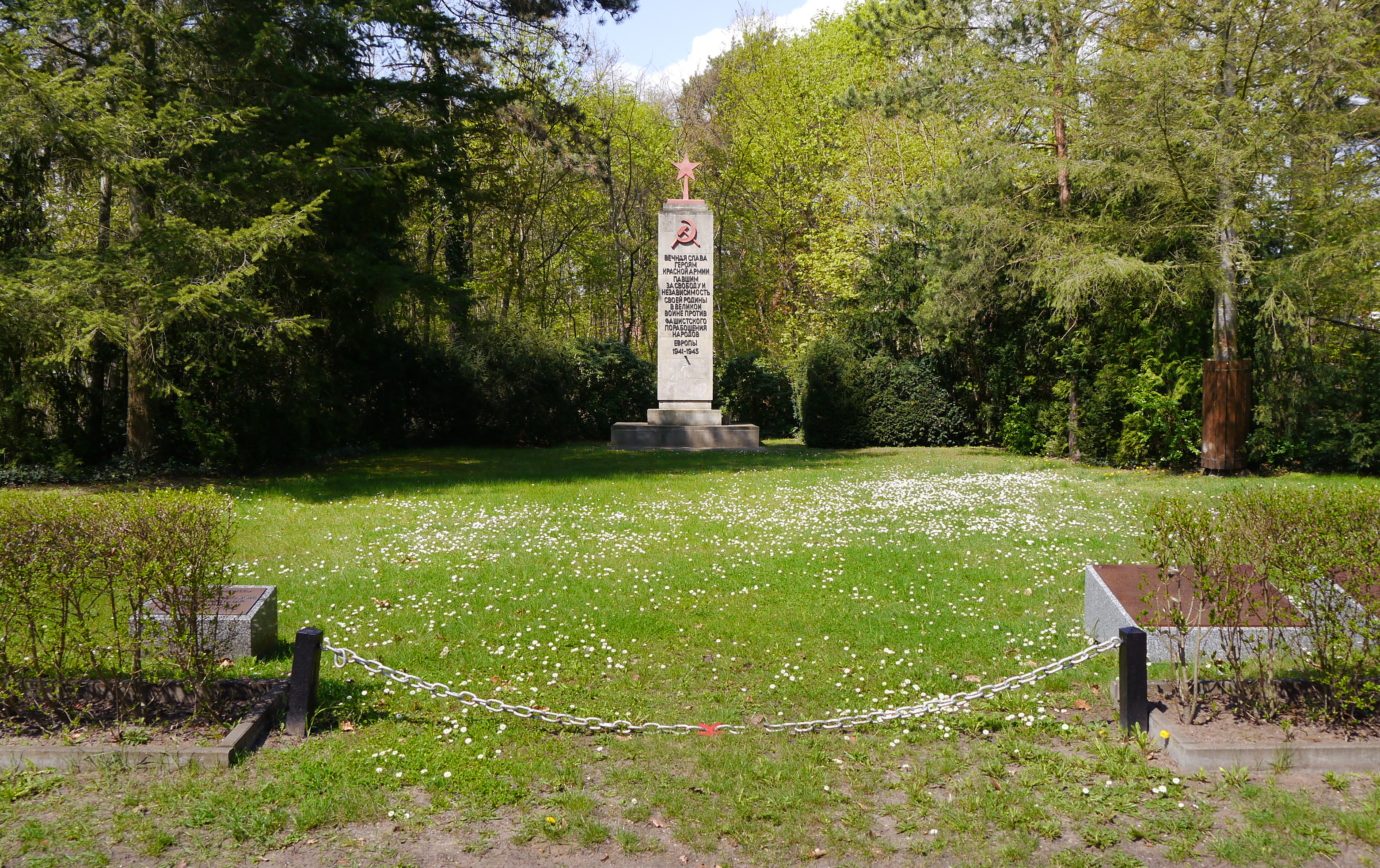 Baudenkmal: Sowjetisches Ehrenmal, Kleinmachnow, Hohe Kiefer